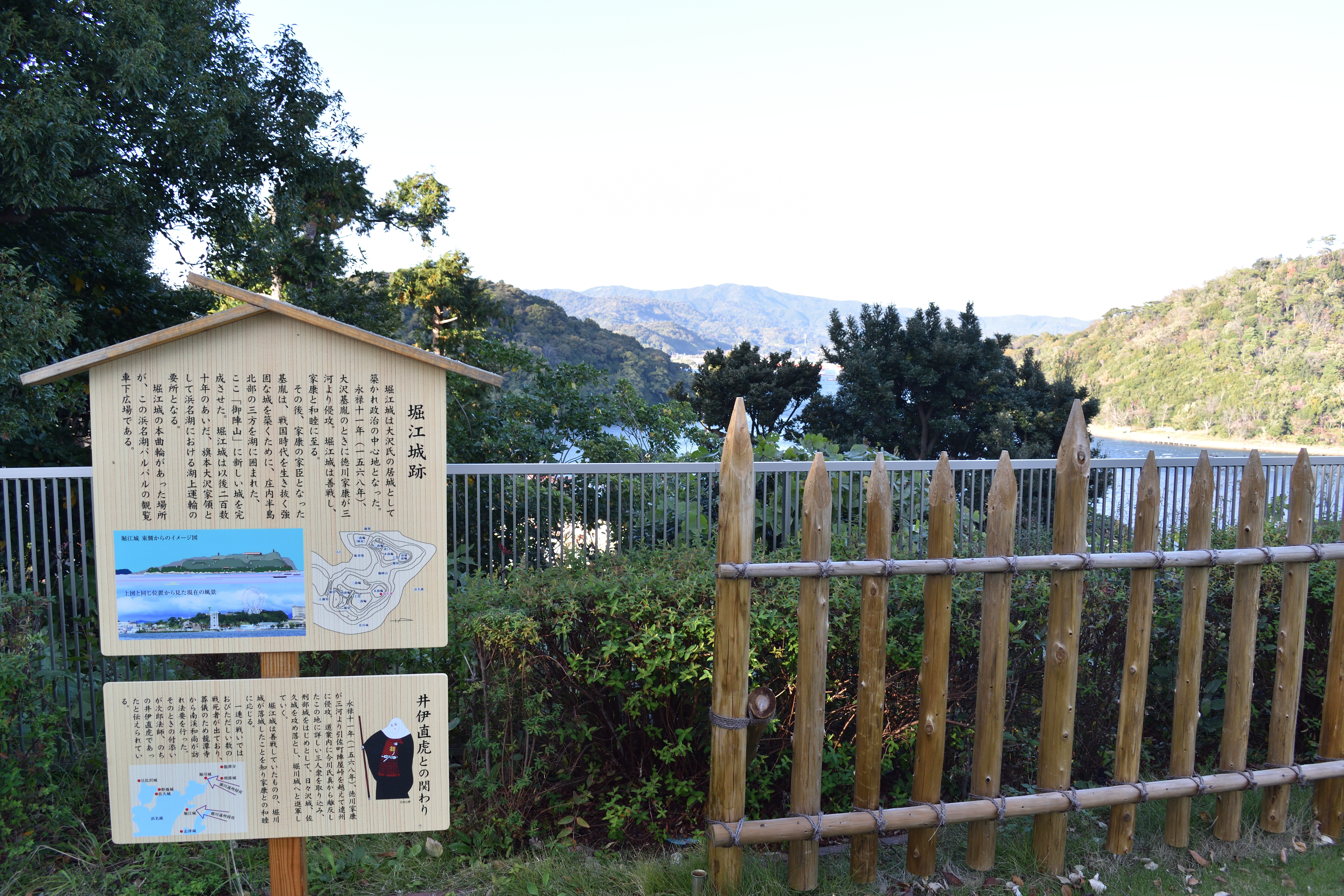 堀江城址の案内。浜名湖パルパル園内、大観覧車下。